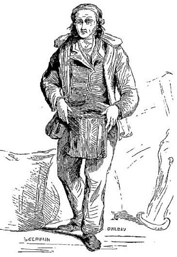 Plougastel-Daoulas : paysan de Plougastel vers 1854 (dessin de Saint-Germain, Les Français peints par eux-mêmes)